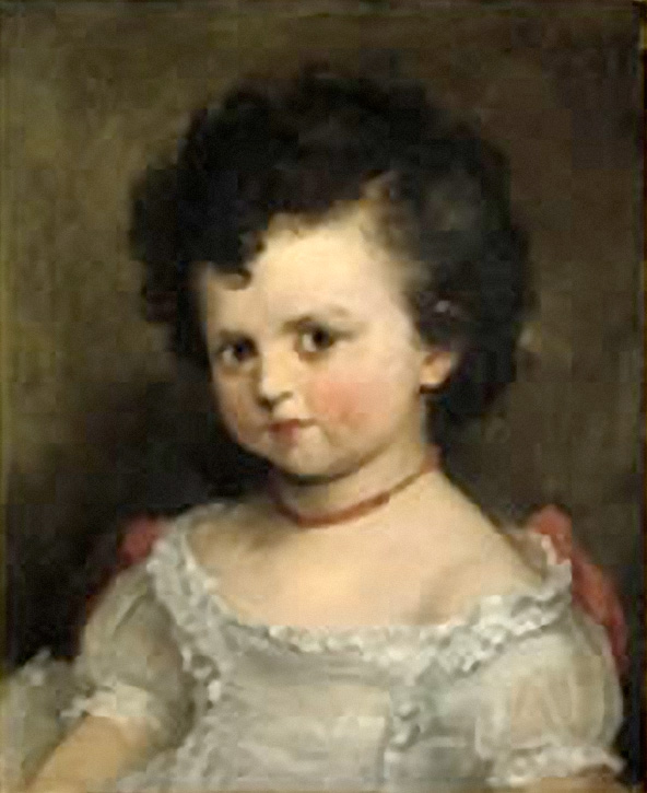 Mädchenportrait